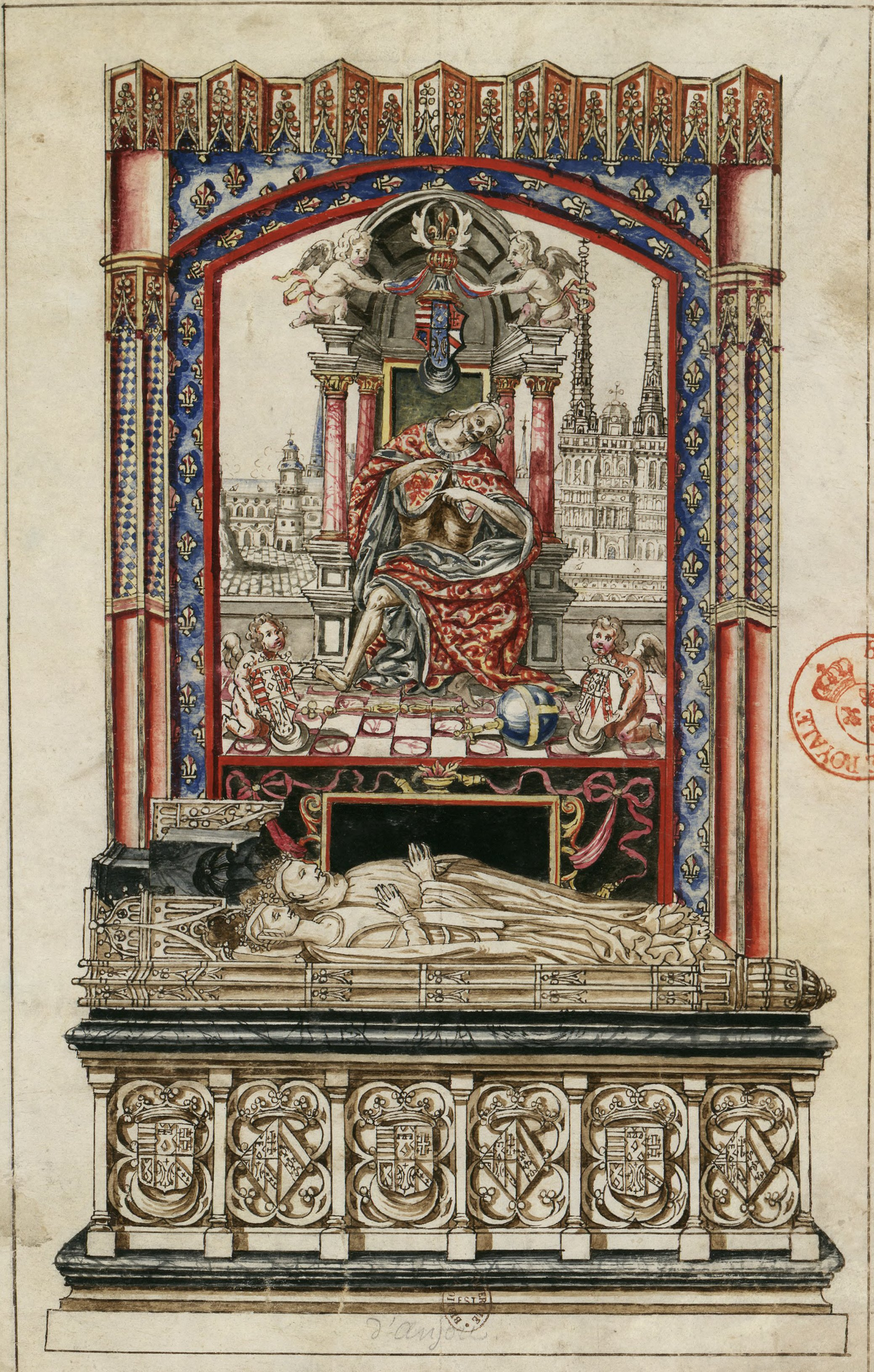 Náhrobek krále Reného a manželky Isabely